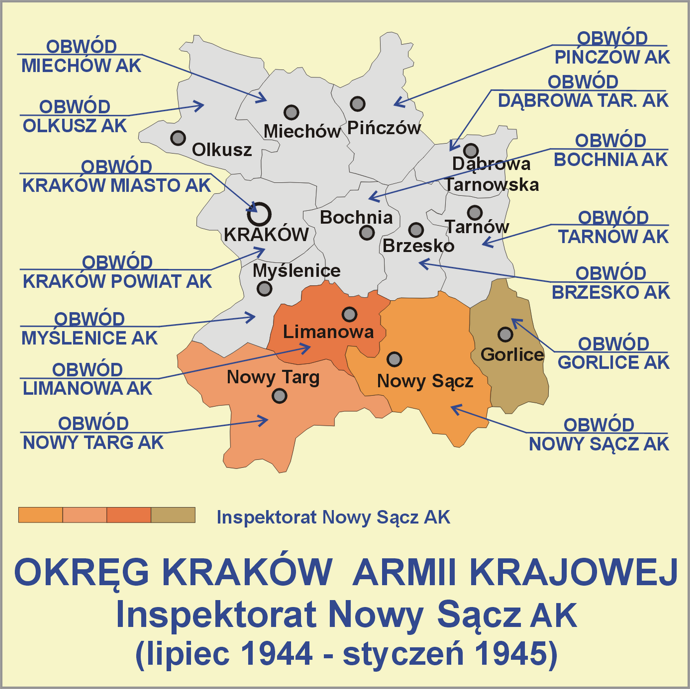 Okręg Kraków Armii Krajowej - Inspektorat Nowy Sącz (lipiec 1944 - styczeń 1945)